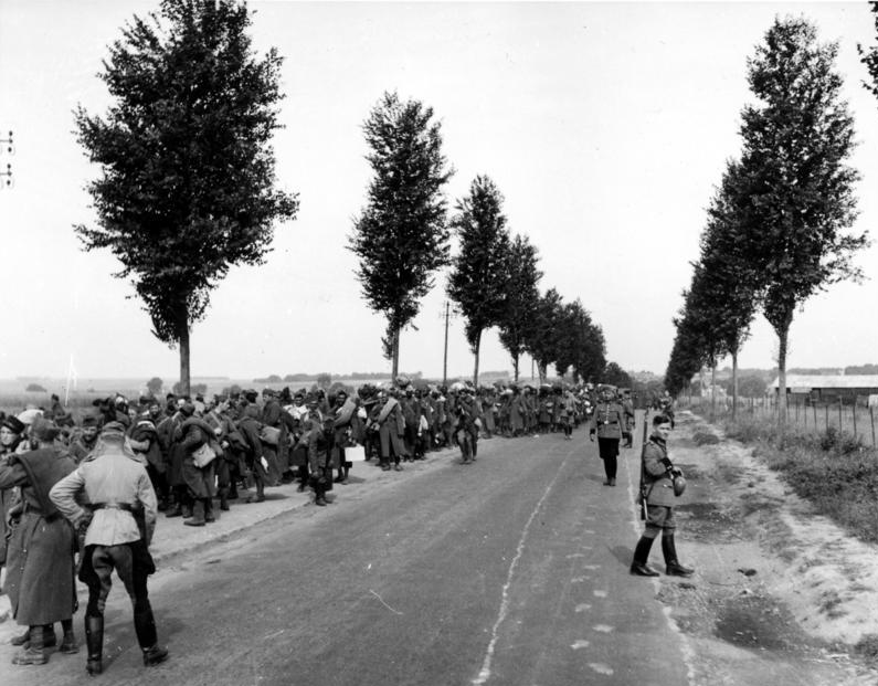 Schutzpolizei bei Gefangenenmarsch